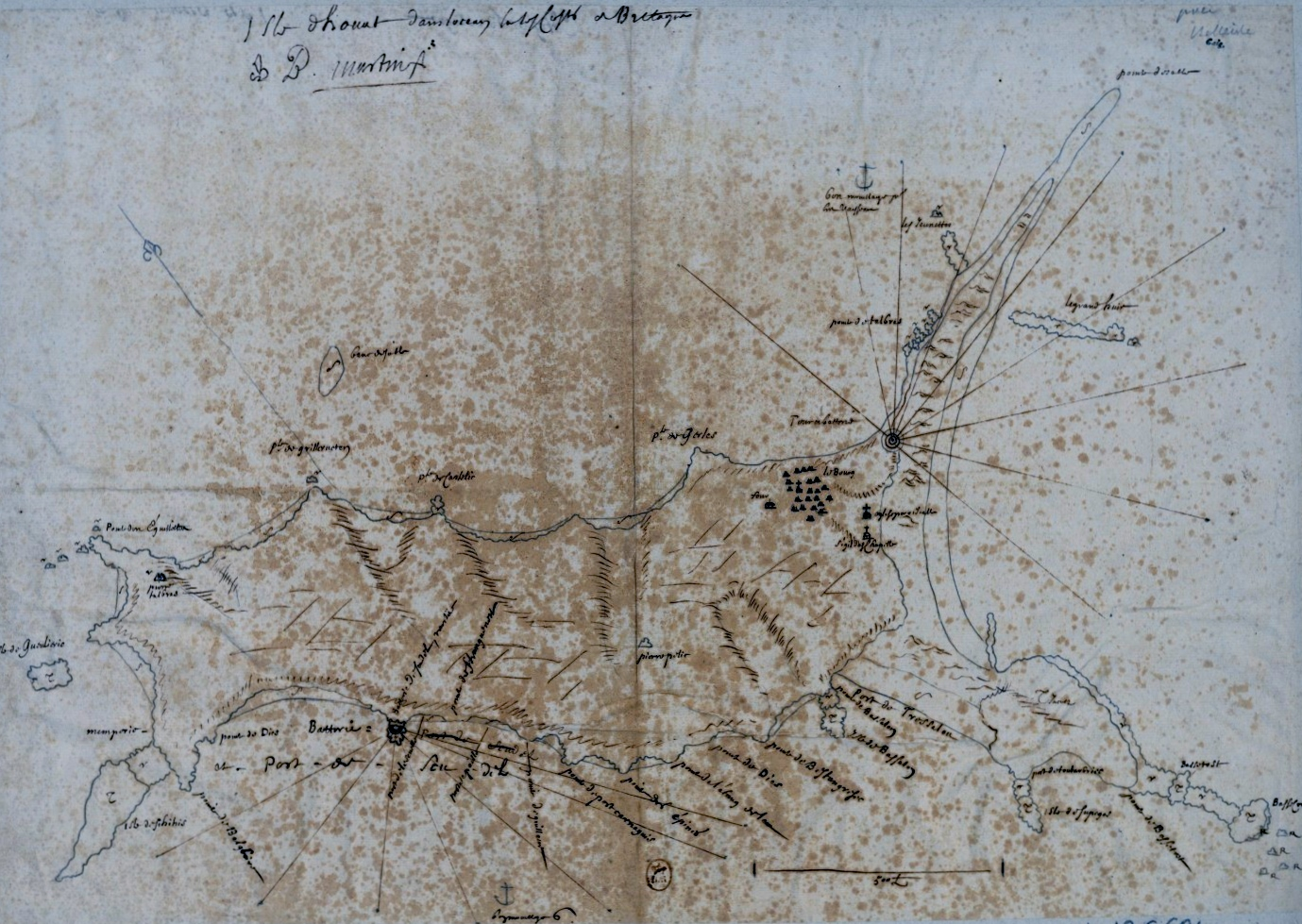 Carte de l'île d'Houat au XVIIème siècle (dessin de B. Martin)